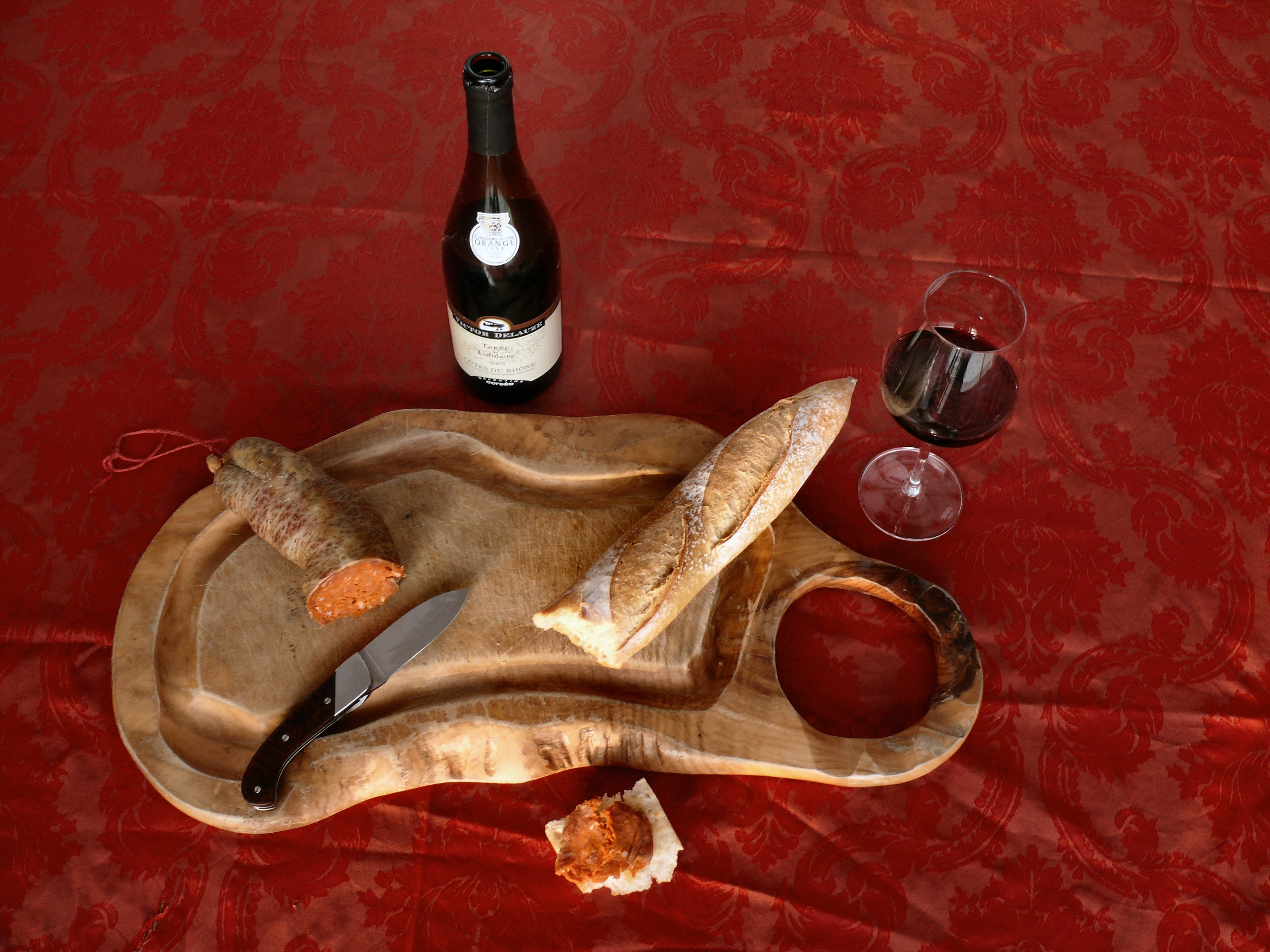 Côtes-du-rhône et soubressade